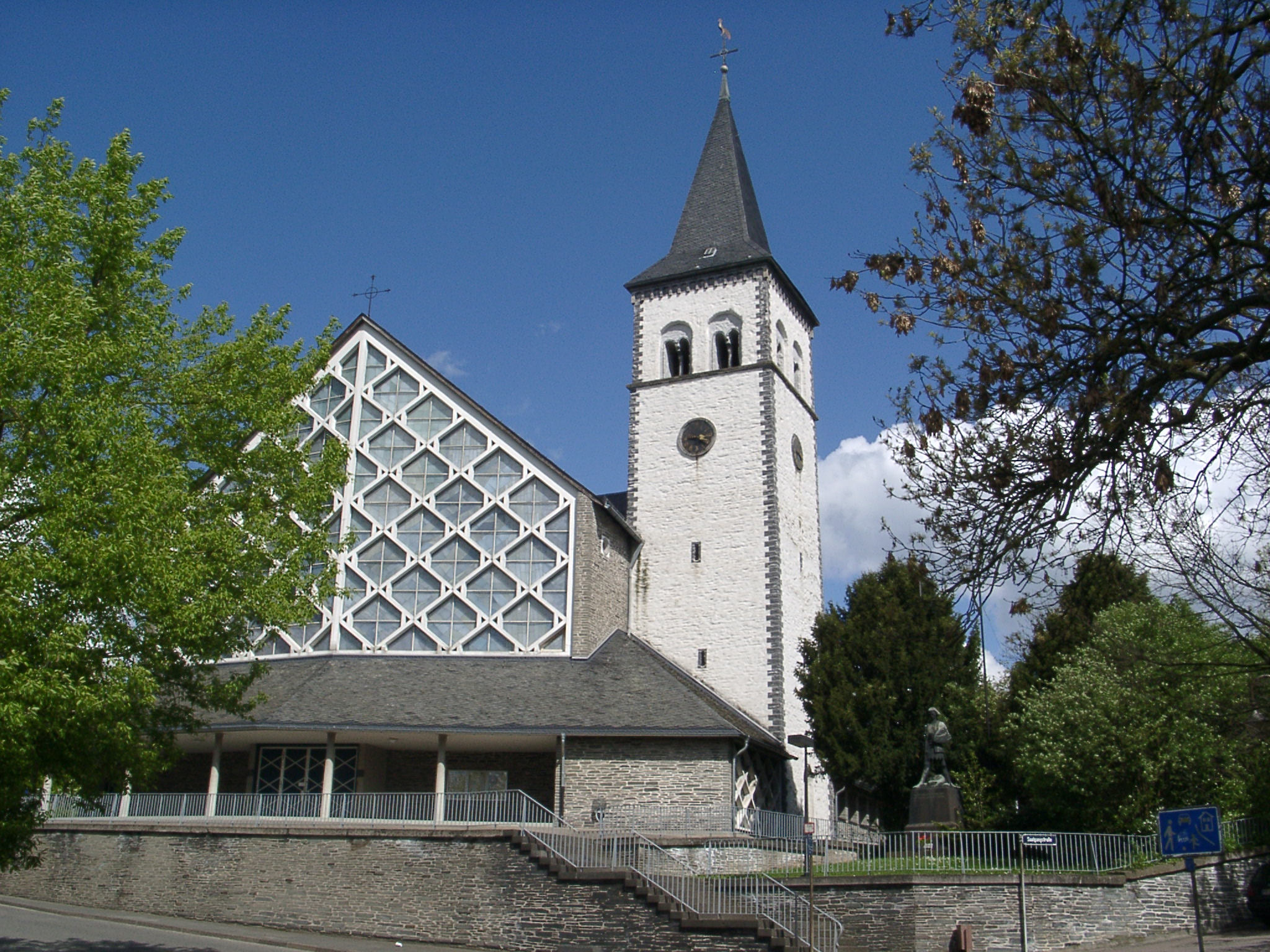 Kirche von Ochtendung - selbst fotografiert (Klaus Graf) 27.4.2005